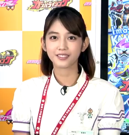 Ruka Matsuda, actress of the Grick Inc., appeared on the データカードダス 仮面ライダーガンバライジング ガシャットヘンシン 大はっぴょうかい.